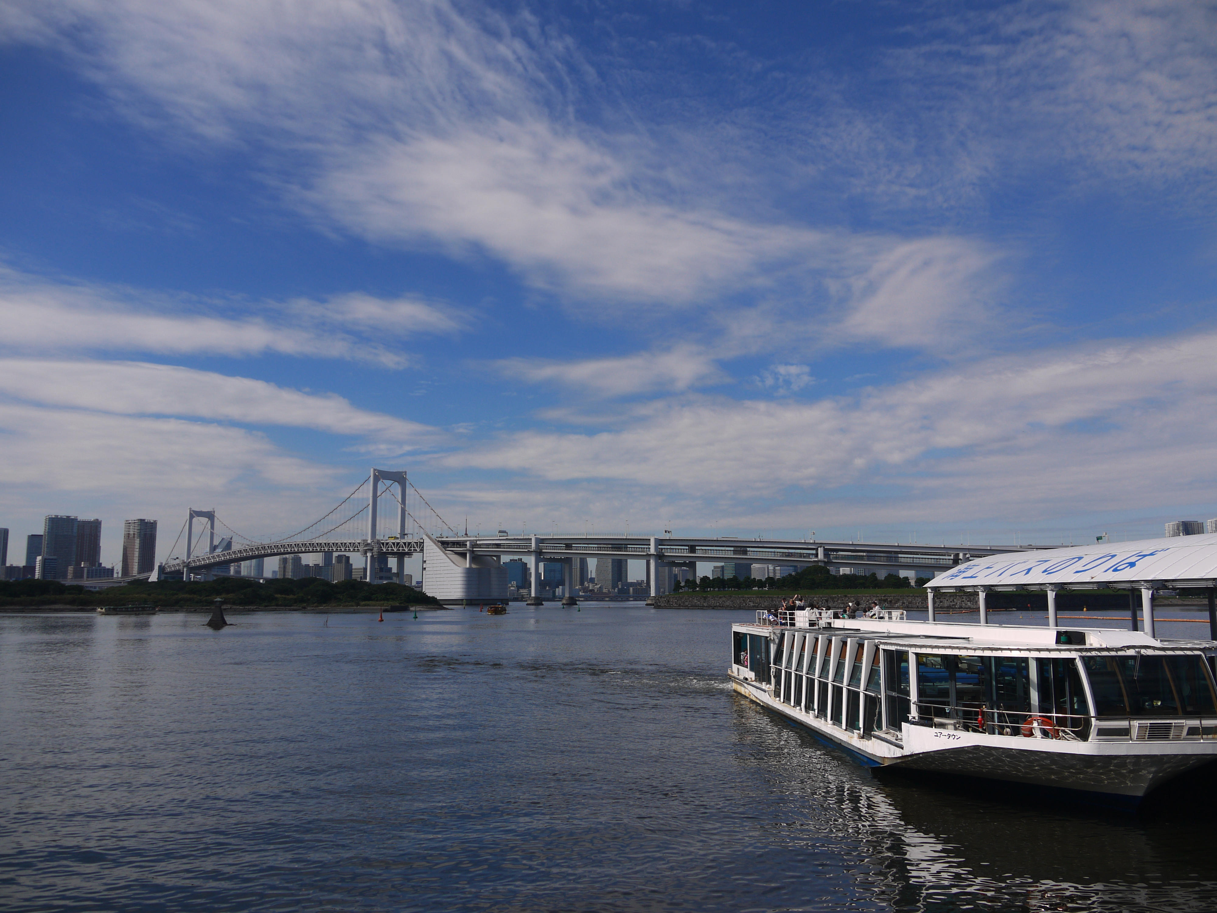 Odaiba Seaside Park water bus stop (水上バスのりば お台場海浜公園)